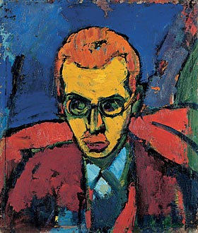 Bildnis Itten, 1913, Öl auf Leinwand, 58,5 x 50,5 cm, unsigniert; Westfälisches Landesmuseum für Kunst und Kulturgeschichte Münster (Inv.-Nr. 1303 LM)